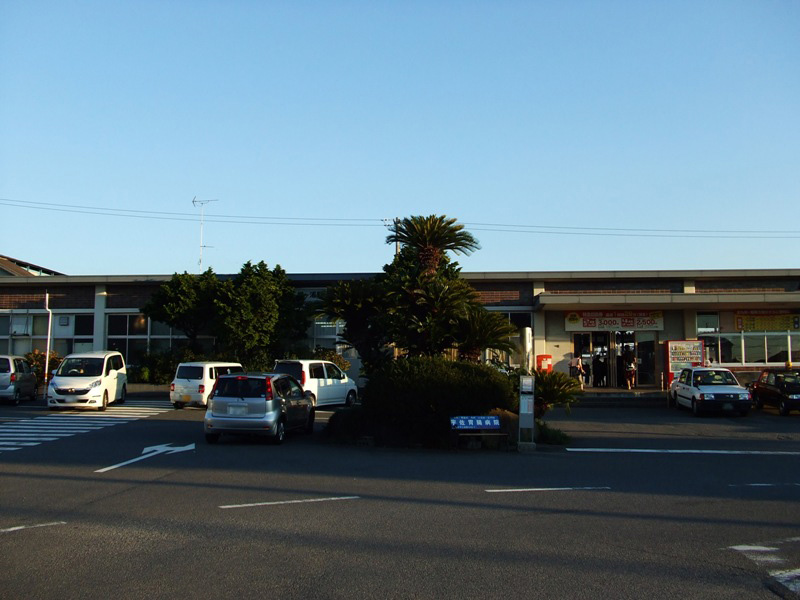 撮影者：葉月裕一（2007年8月14日撮影）